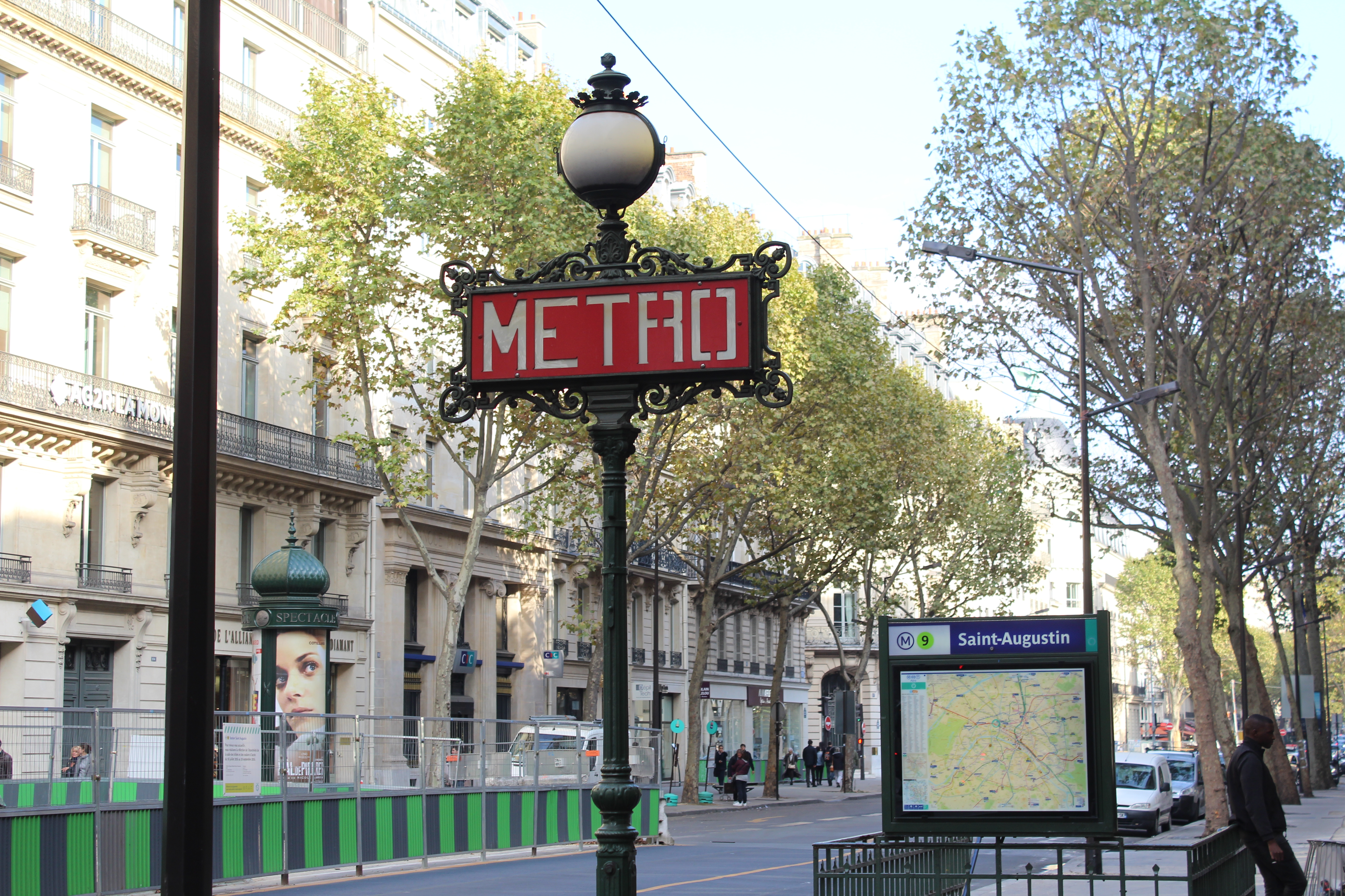 Entrée dans la station Saint-Augustin à Paris.